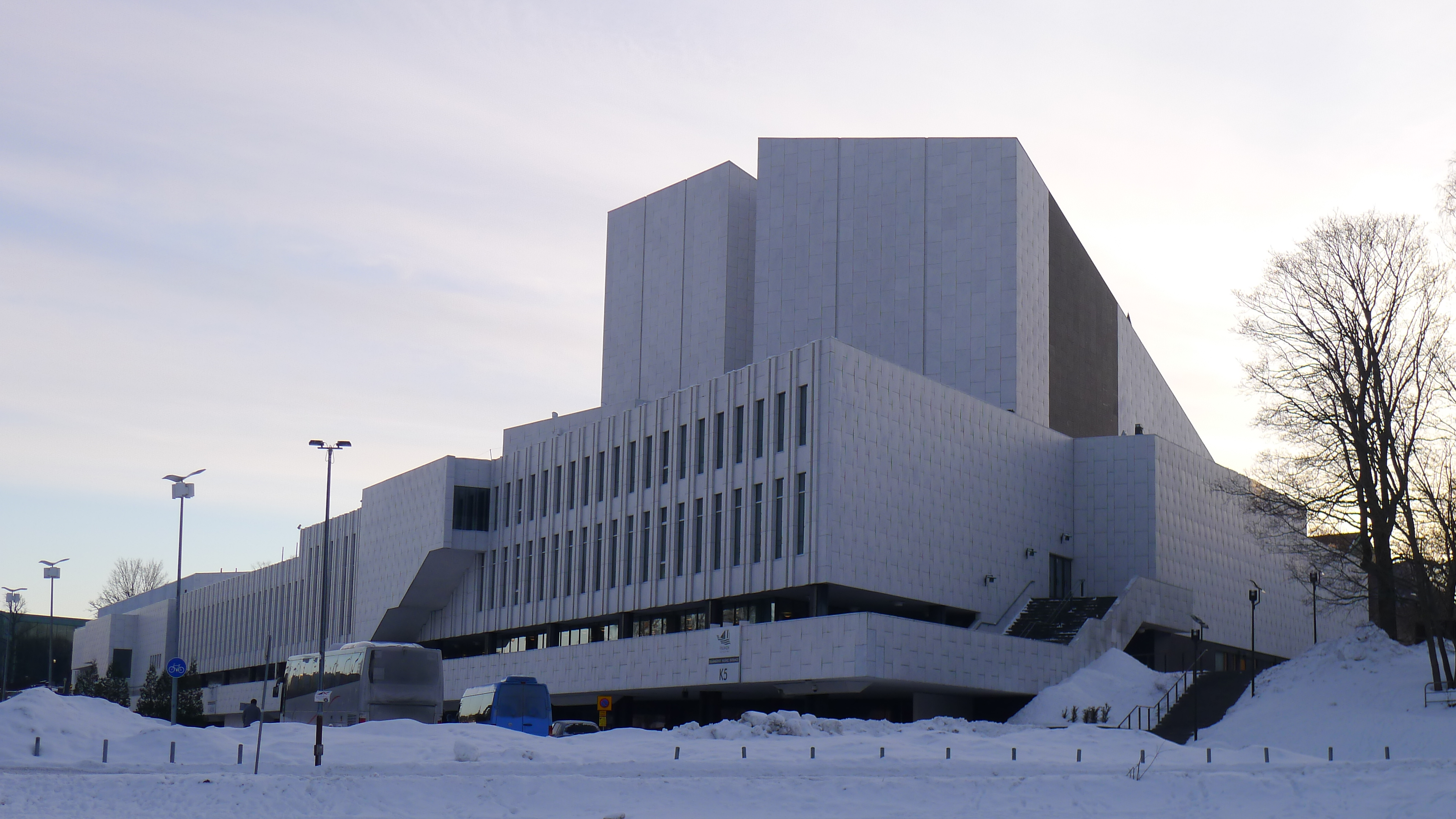 Finlandia-Halle im Winter.